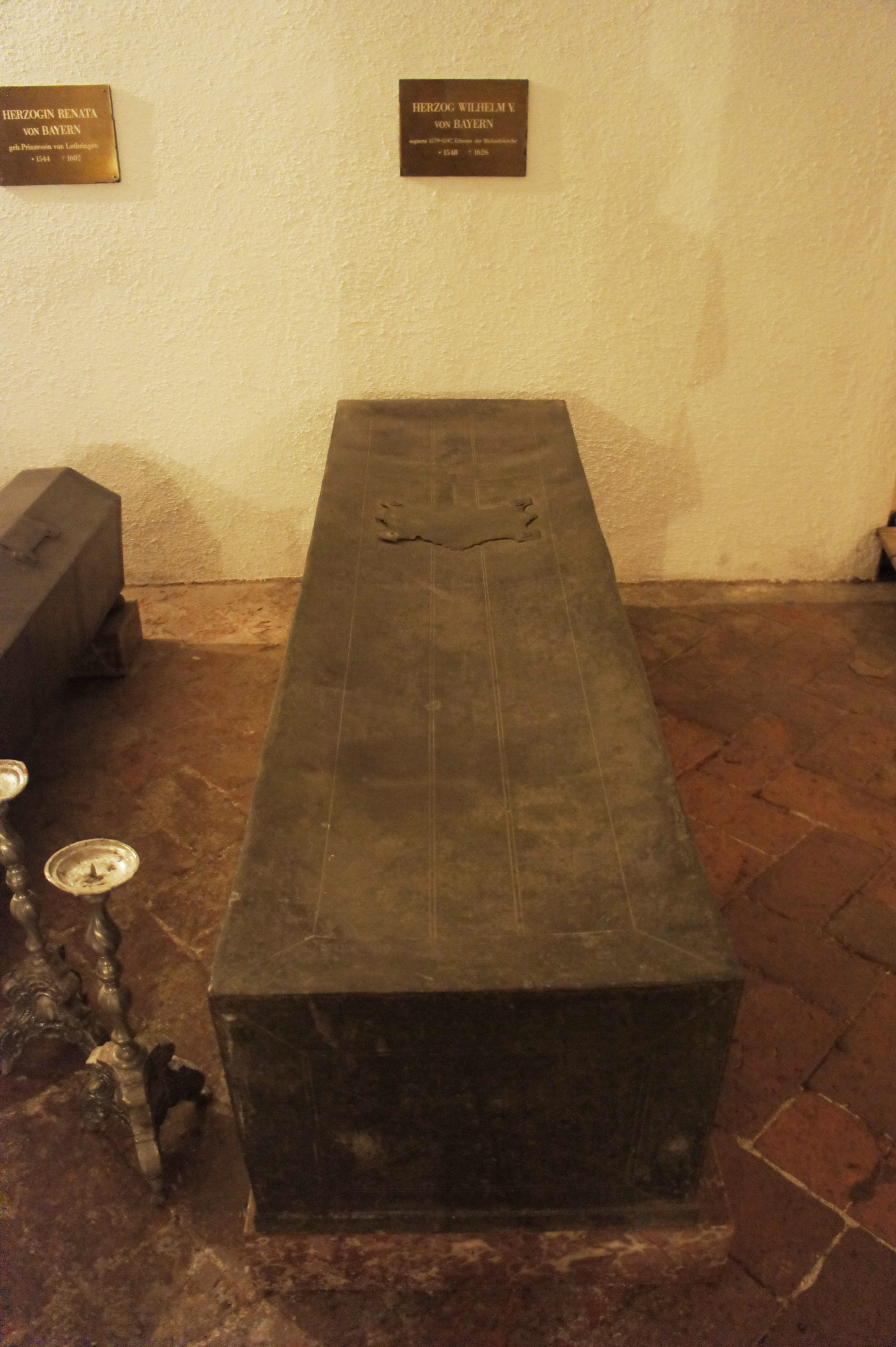 Wilhelm V., Herzog von Bayern (29. September 1548 – 7. Februar 1626). Sarkophag in der Grablege der Wittelsbacher in der St. Michael Kirche in München.